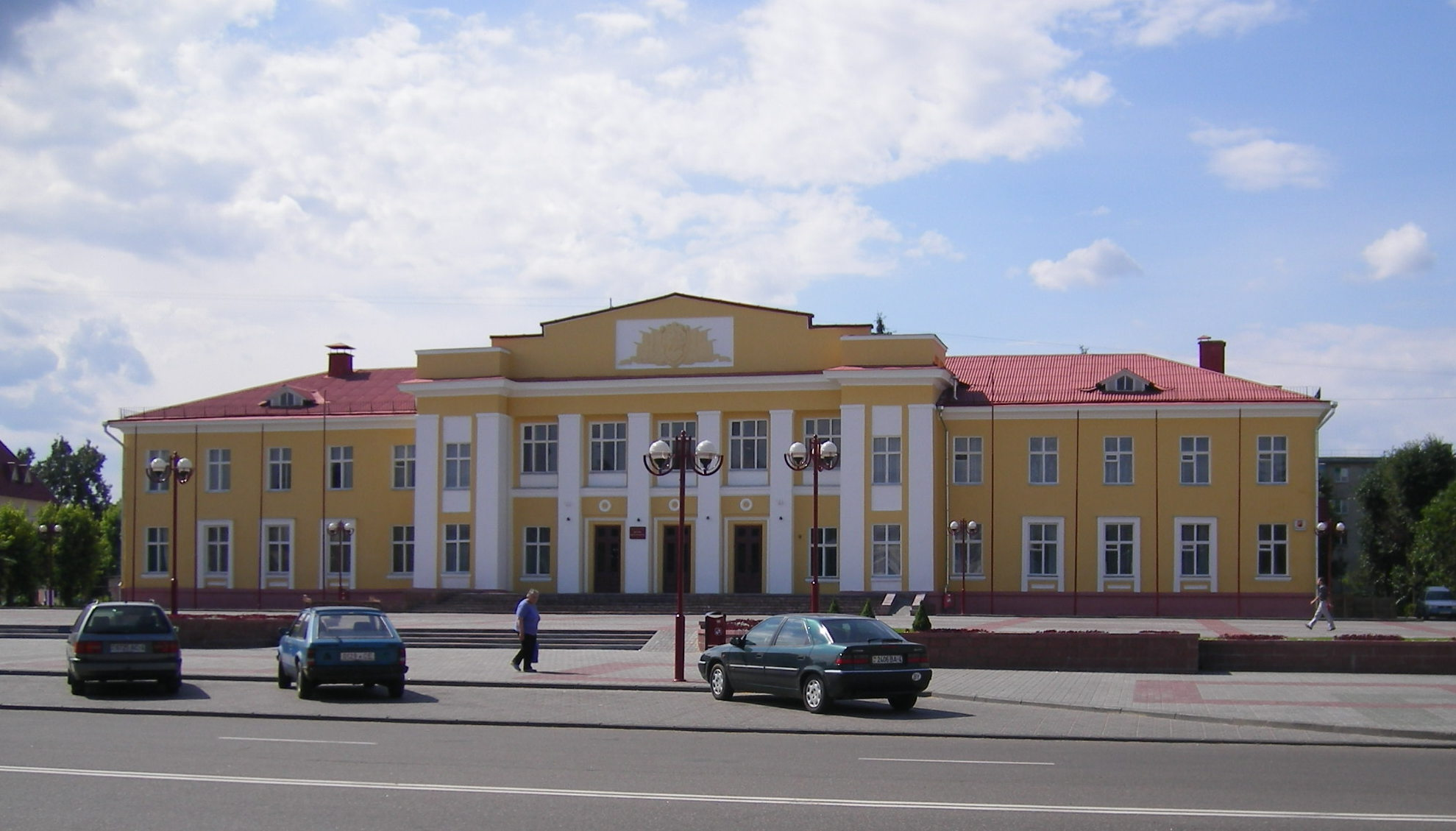 Lida, Sovetskaya street